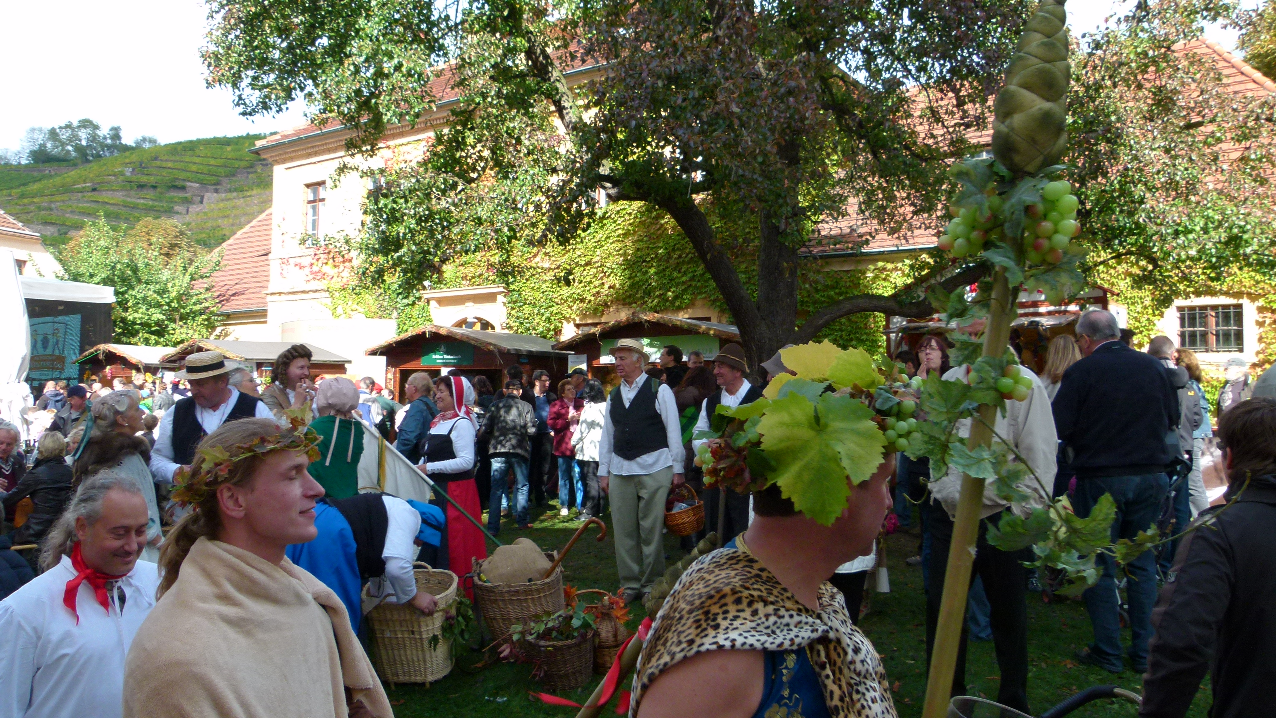 Hoflößnitzer Weinfest, 7. Oktober 2012, Weingut Hoflößnitz, Radebeul